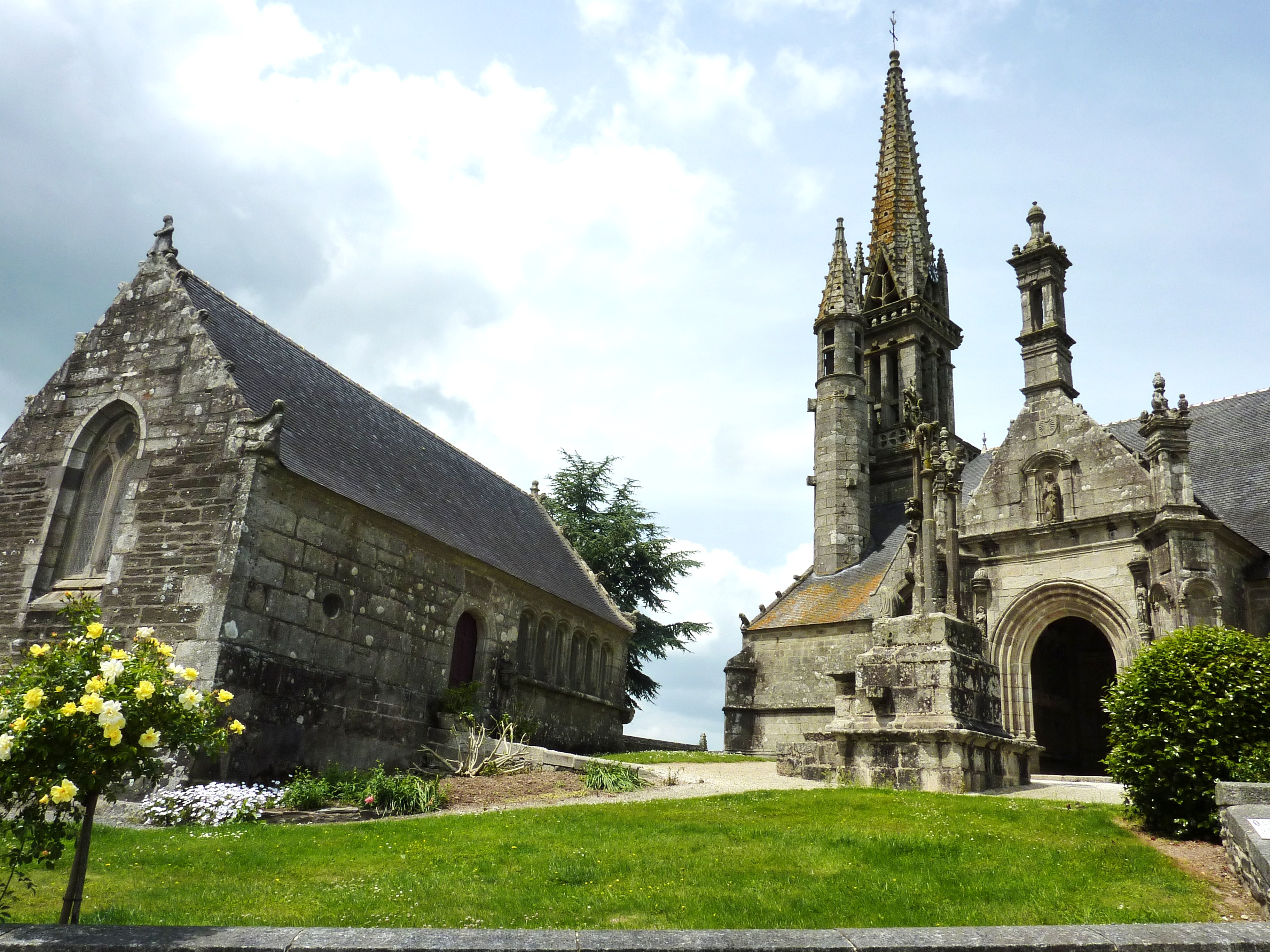 Brasparts: l'enclos paroissial: église, calvaire, ossuaire Česky: Farní kostel Panny Marie a svatého Tugena v Brasparts s kalvárií a márnicí